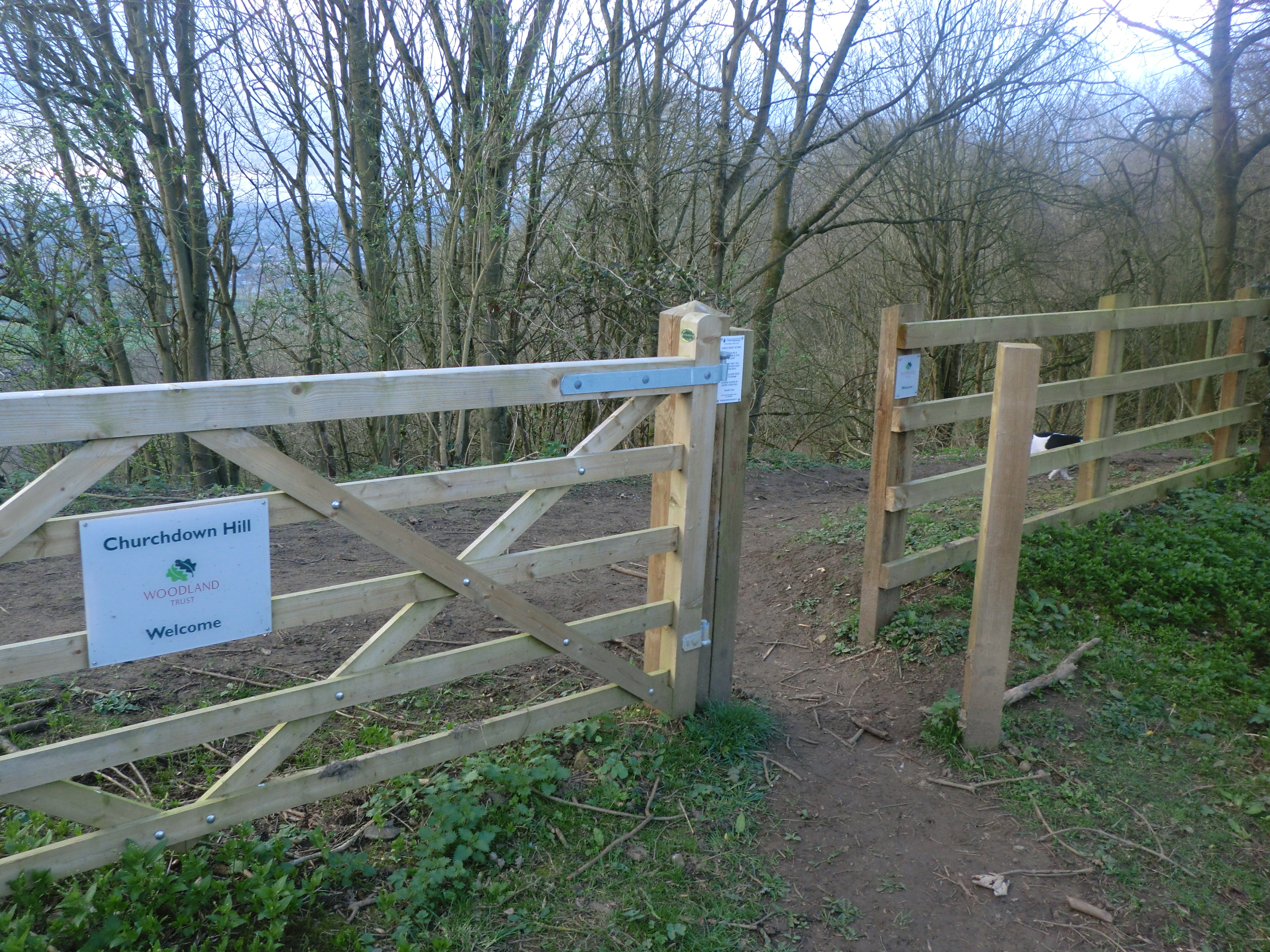 Typisches Gatter auf dem Churchdown Hill